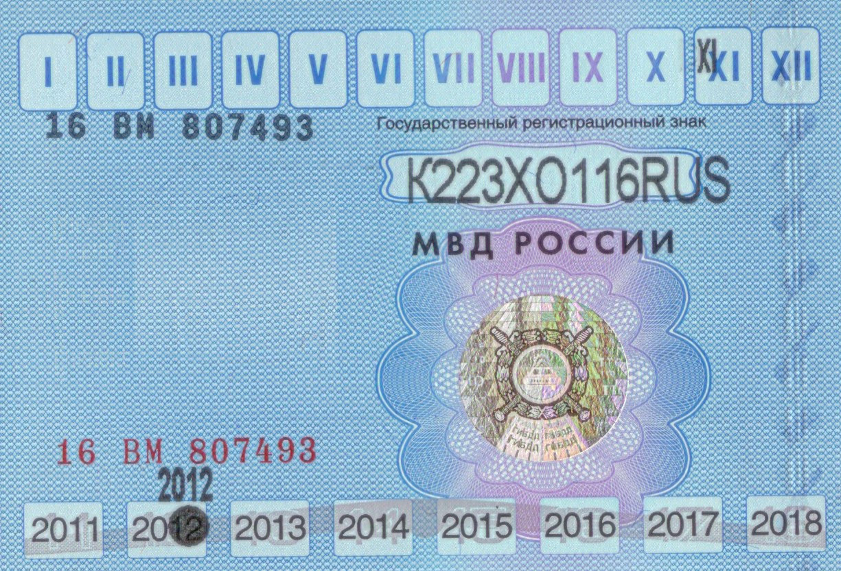 Талон государственного технического осмотра. Россия 2010г